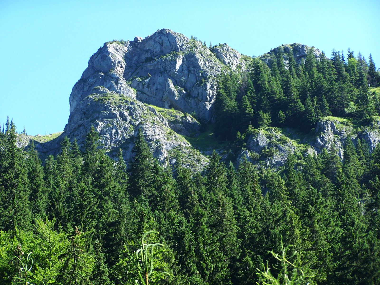 Kończysta Turnia (Tatra Mountains)